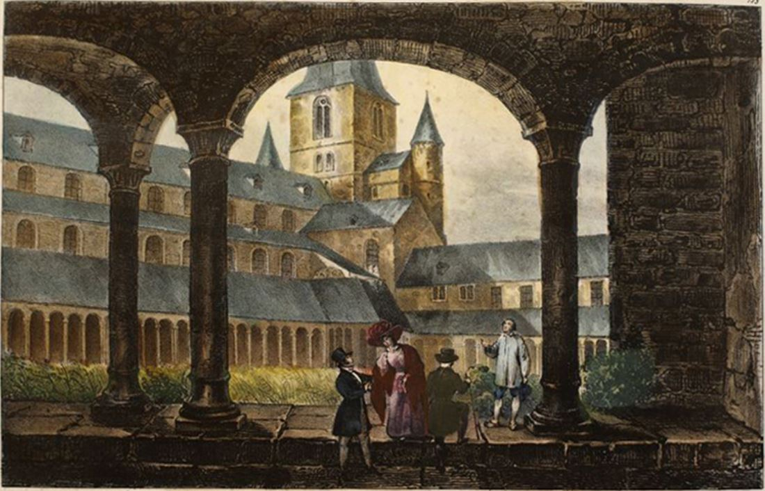 Intérieur du Cloitre de Ste. Gertrude, à Nivelles